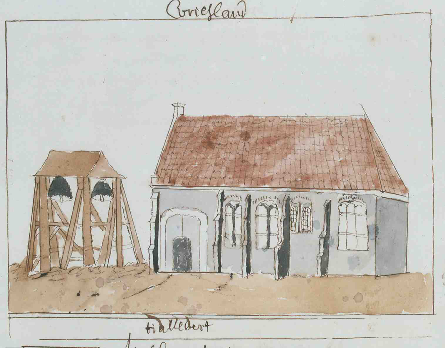 Korte Beschreijving van de Steden Dorpen Gehugten en Heeren-huizen der Heerlykheid Vriesland Benevens Desselfs Afbeeldingen Meest na 't leven getekent By een Vergaderdt Door Andries Schoemaker